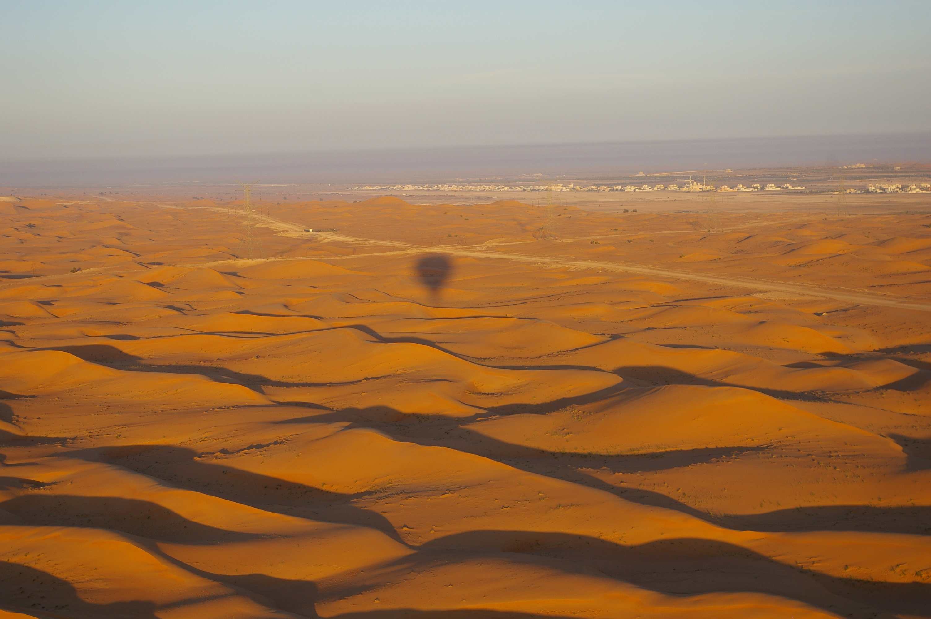 Desert in Al Ain, UAE